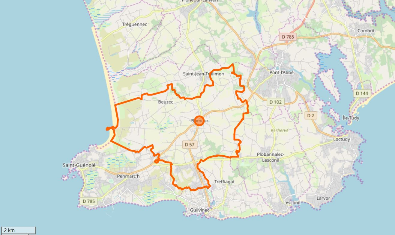 Cette carte a été créée à partir des données du projet openstreetmap. This map may be incomplete, and may contain errors. Don't rely solely on it for navigation.